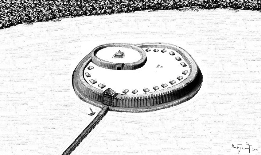 Rekonstruktionsversuch